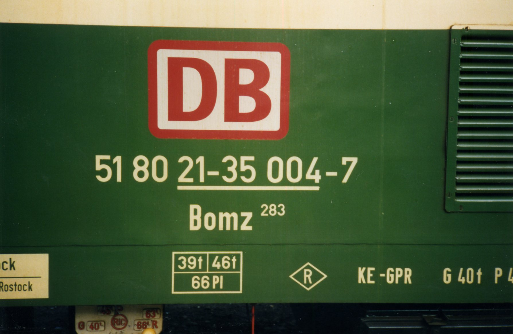 newly acquired DB carriages from the DR system in January 1994, with DB logo and 80 replacing 51 for the former Deutsche Reichsbahn. A different version in early 1994 is here.